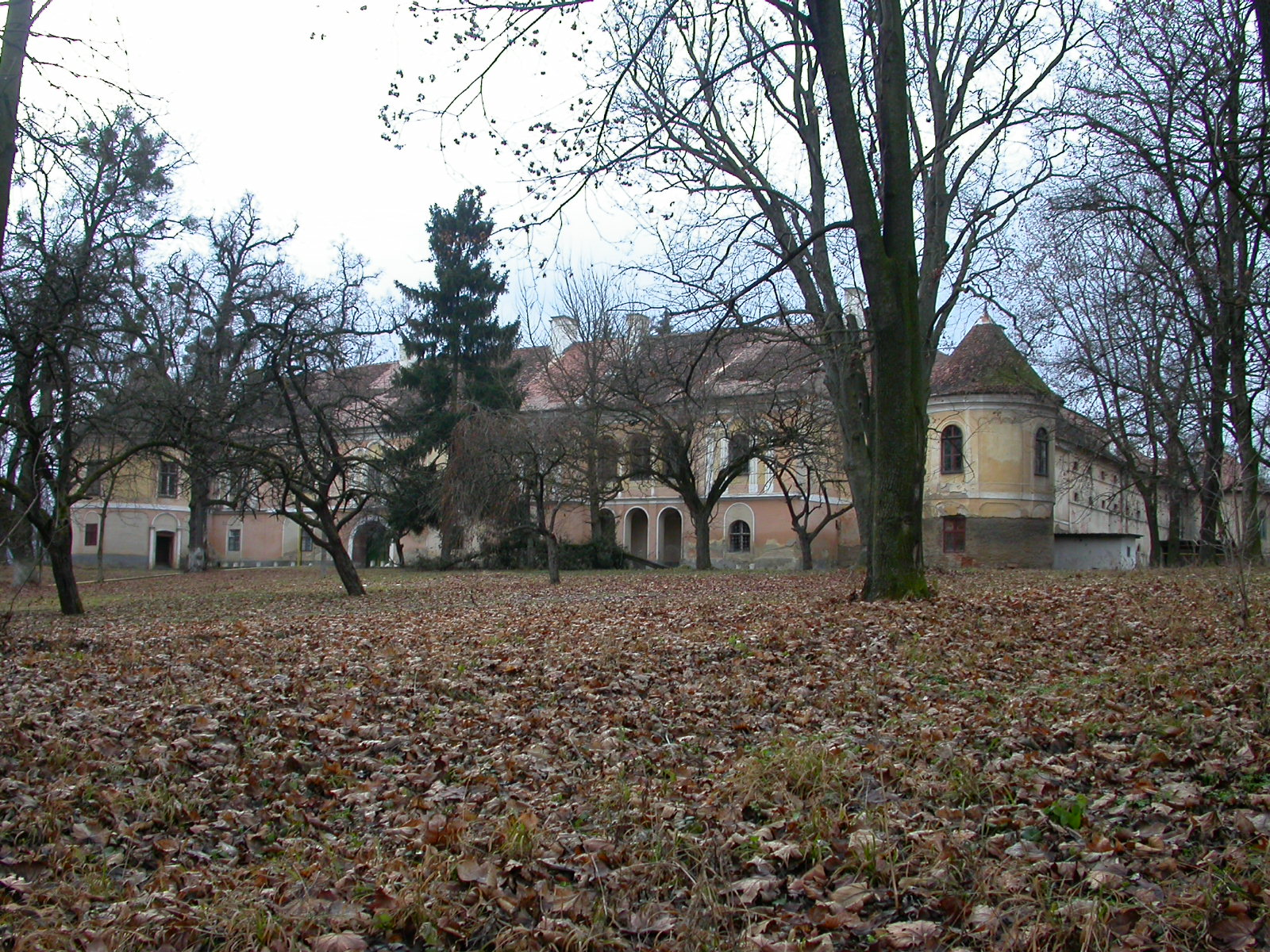 Castelul Wass -Banffy, sec. XV - XIX 05